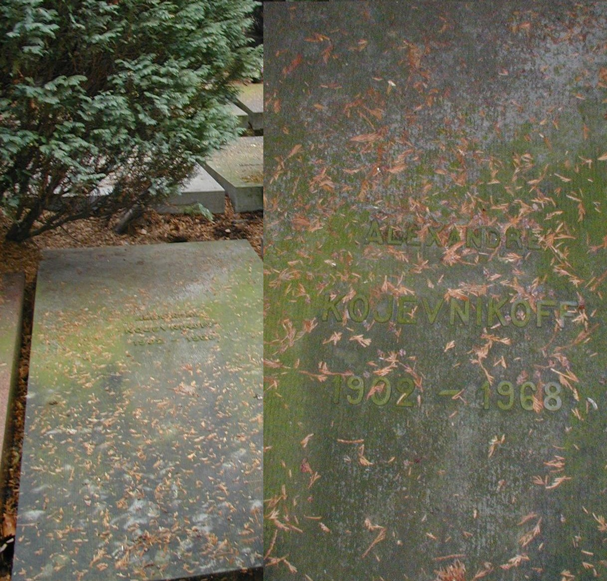 Tombe du philosophe français d'origine russe Alexandre Kojève, à Evere (Bruxelles).